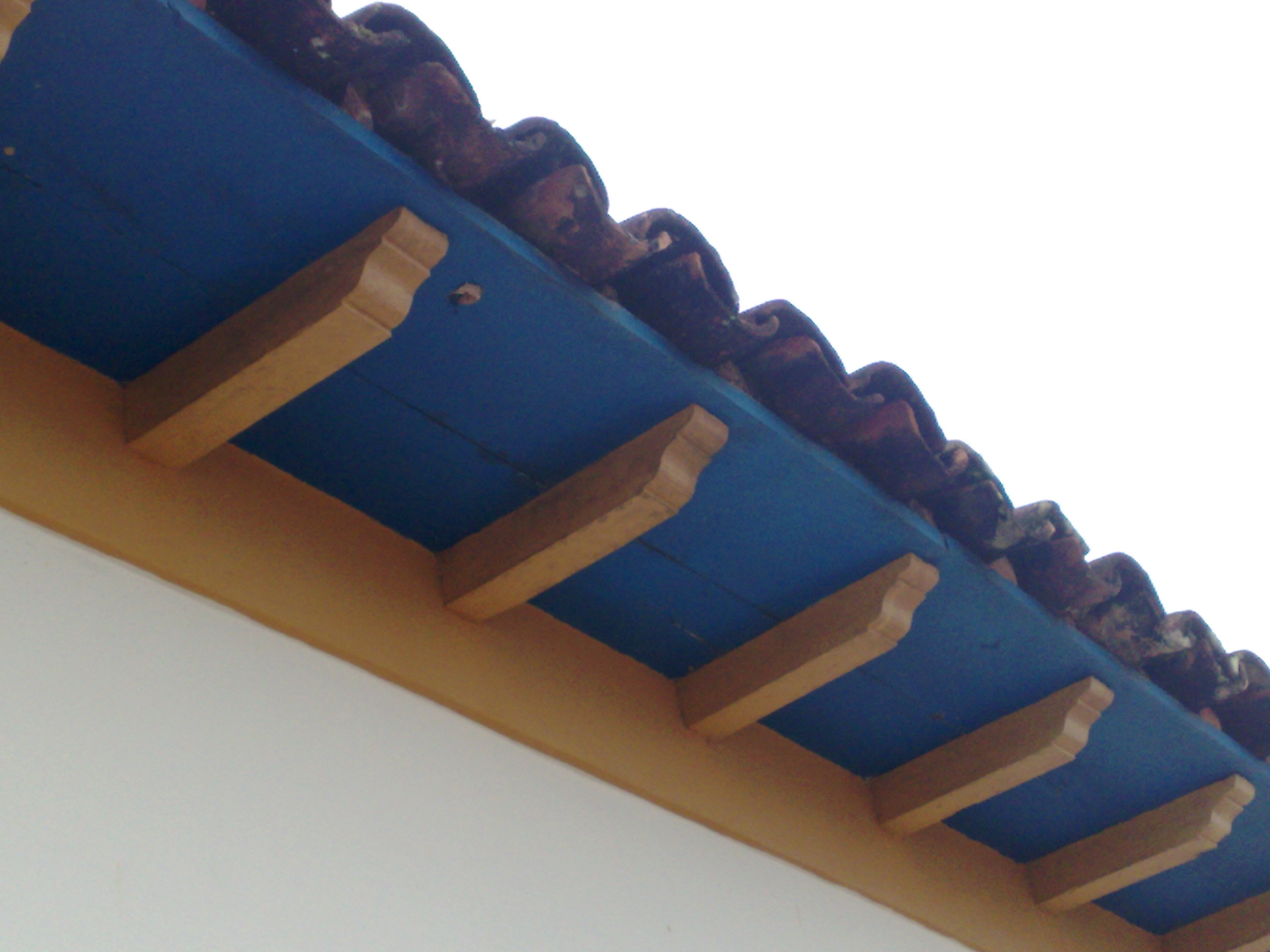 Beiral típico de construção do séc. XVIII, colonial Português. Na cidade de Tiradentes, Minas Gerais, Brasil.